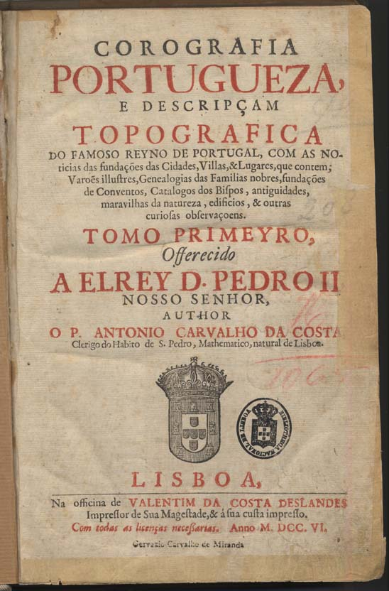 Página de rosto da Corografia Portuguesa, 1706-1712 - Lisboa. Autoria de António Carvalho da Costa.